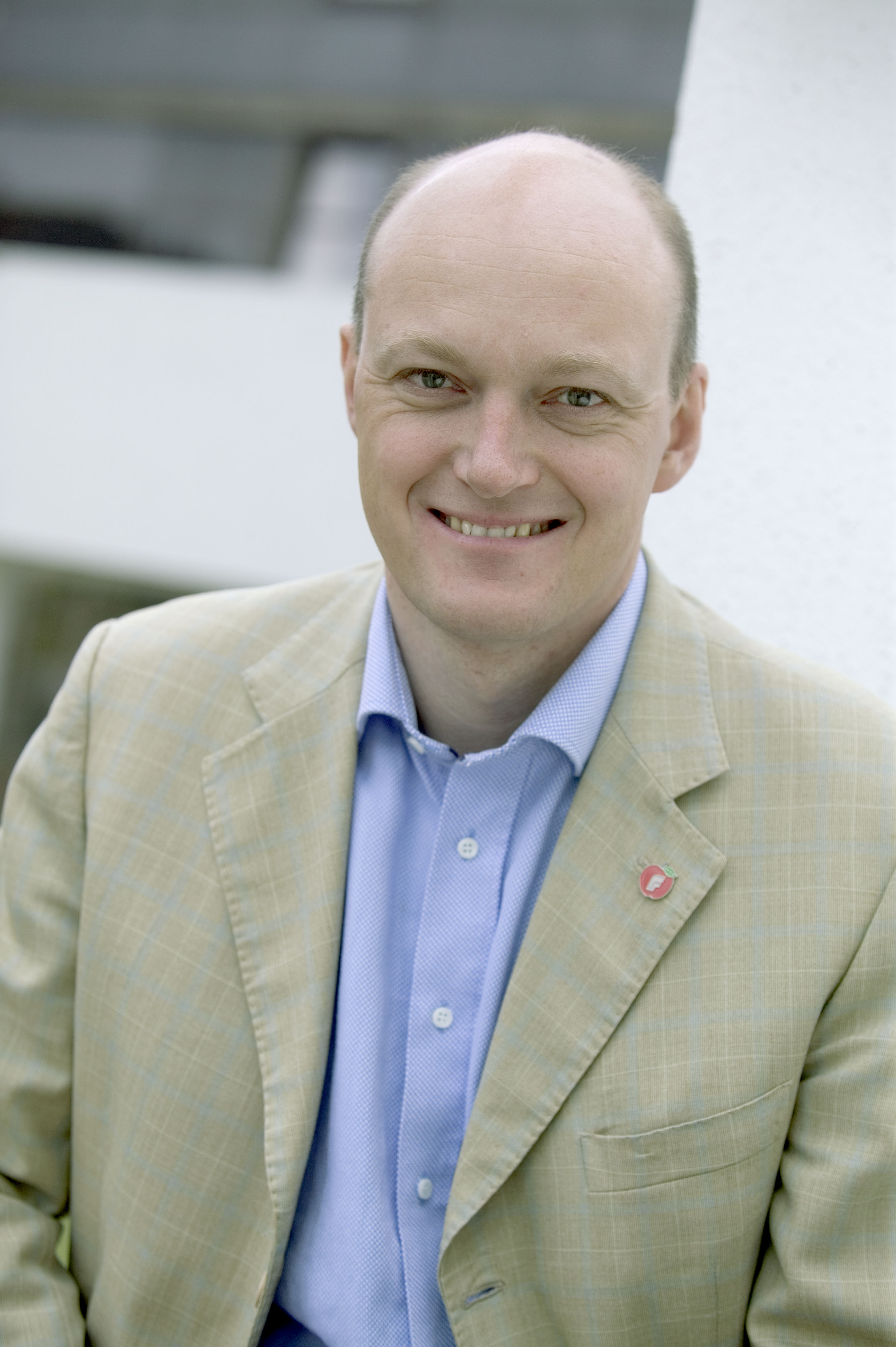 Hans Frode Asmyhr, FrP-politiker